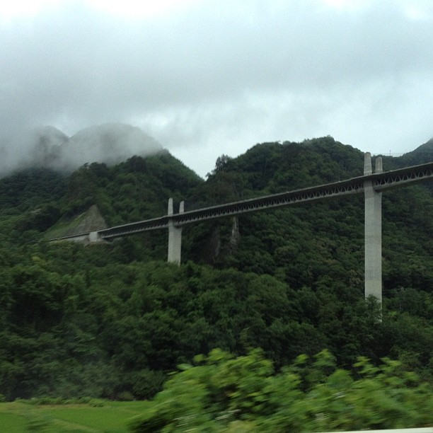 The Fudo extradossed bridge